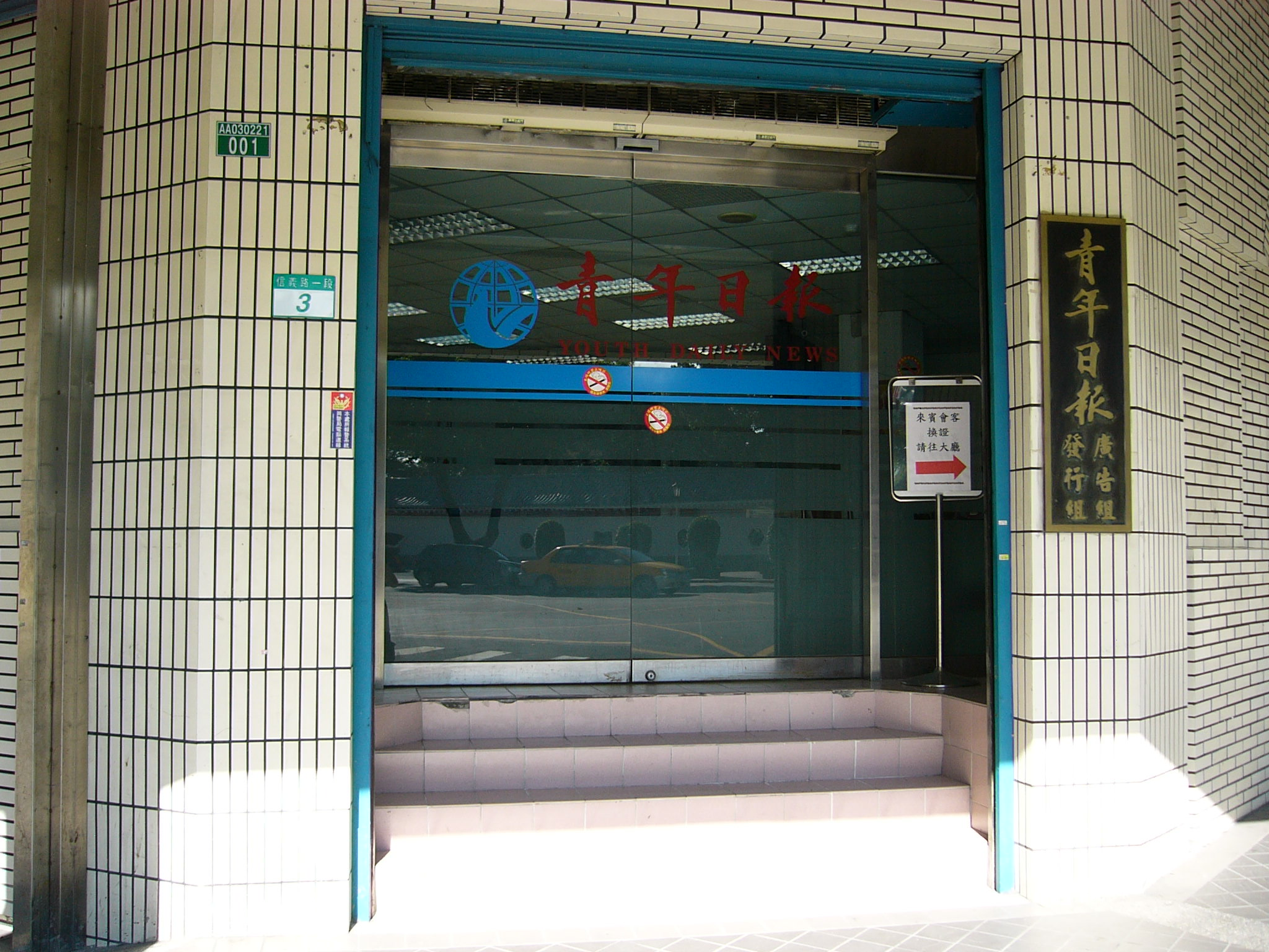 青年日報社廣告組及發行組大門，位於臺北市中正區信義路一段3號1樓。